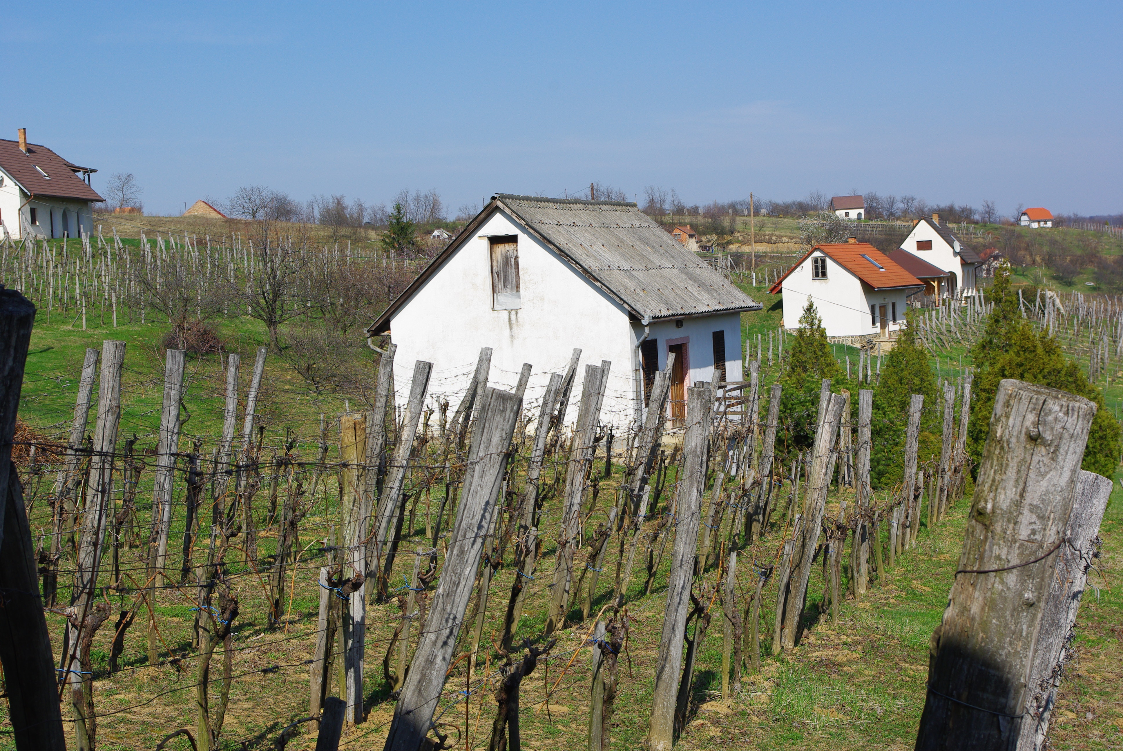 Mecseknádasd wijngaard kwart eeuw